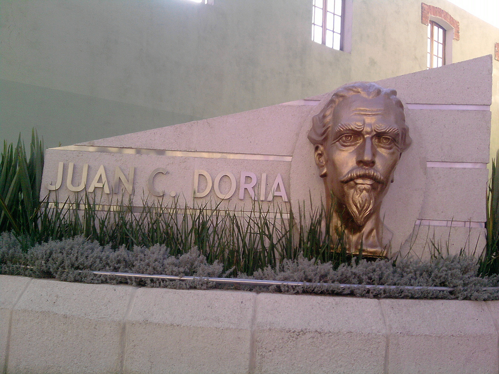 Plaza juan c doria en Pachuca